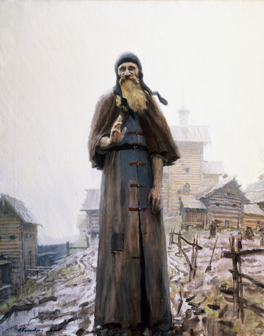 Сергей Кириллов. «Преподобный Сергий Радонежский. (Благословение). Вторая часть трилогии «Святая Русь». 1992. Х.м. 100x80